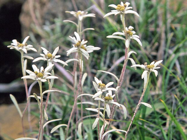 ホソバヒナウスユキソウ 2011年7月尾瀬・至仏山にて撮影